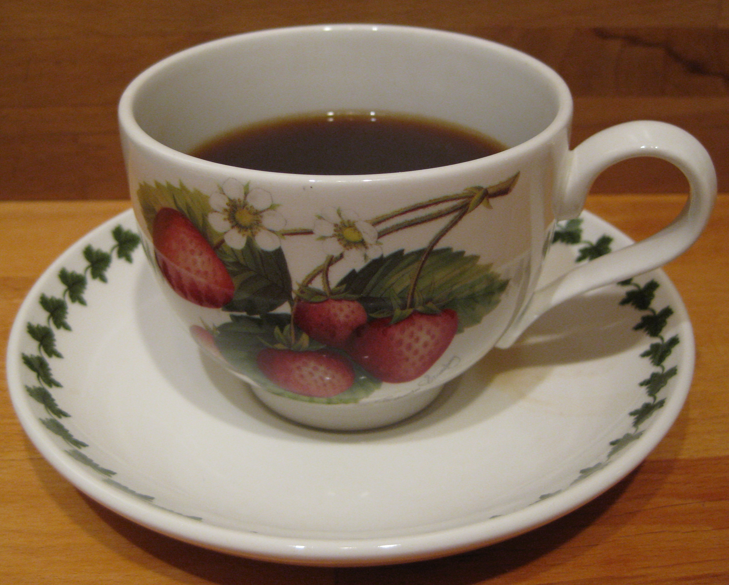 Tasse des britischen Herstellers Portmeirion, Serie Pomona, Dekor Strawberry